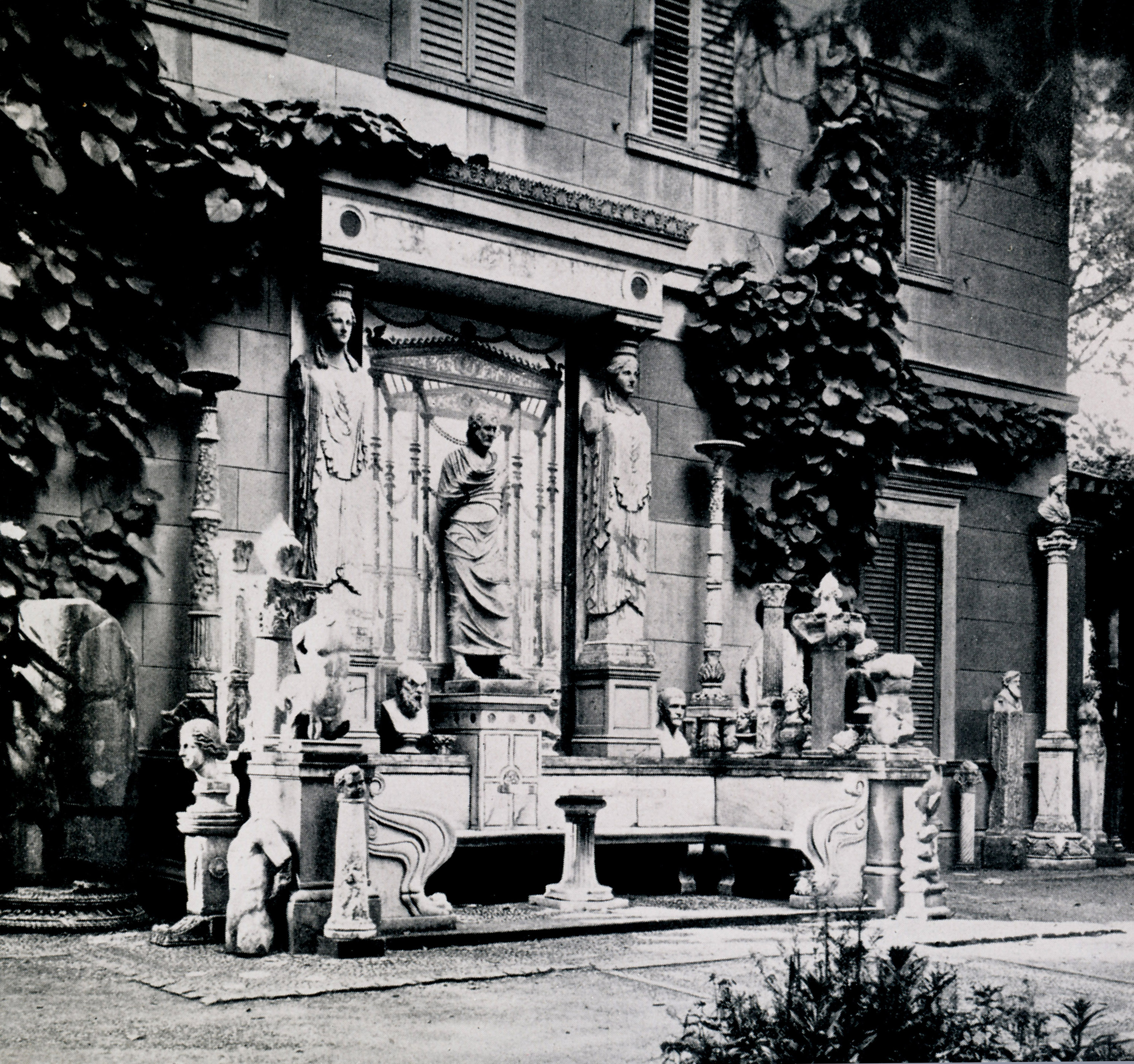 Die Antikenbank an der Ostseite des Casinos von Klein-Glinicke, Robert Scholz 1874/75